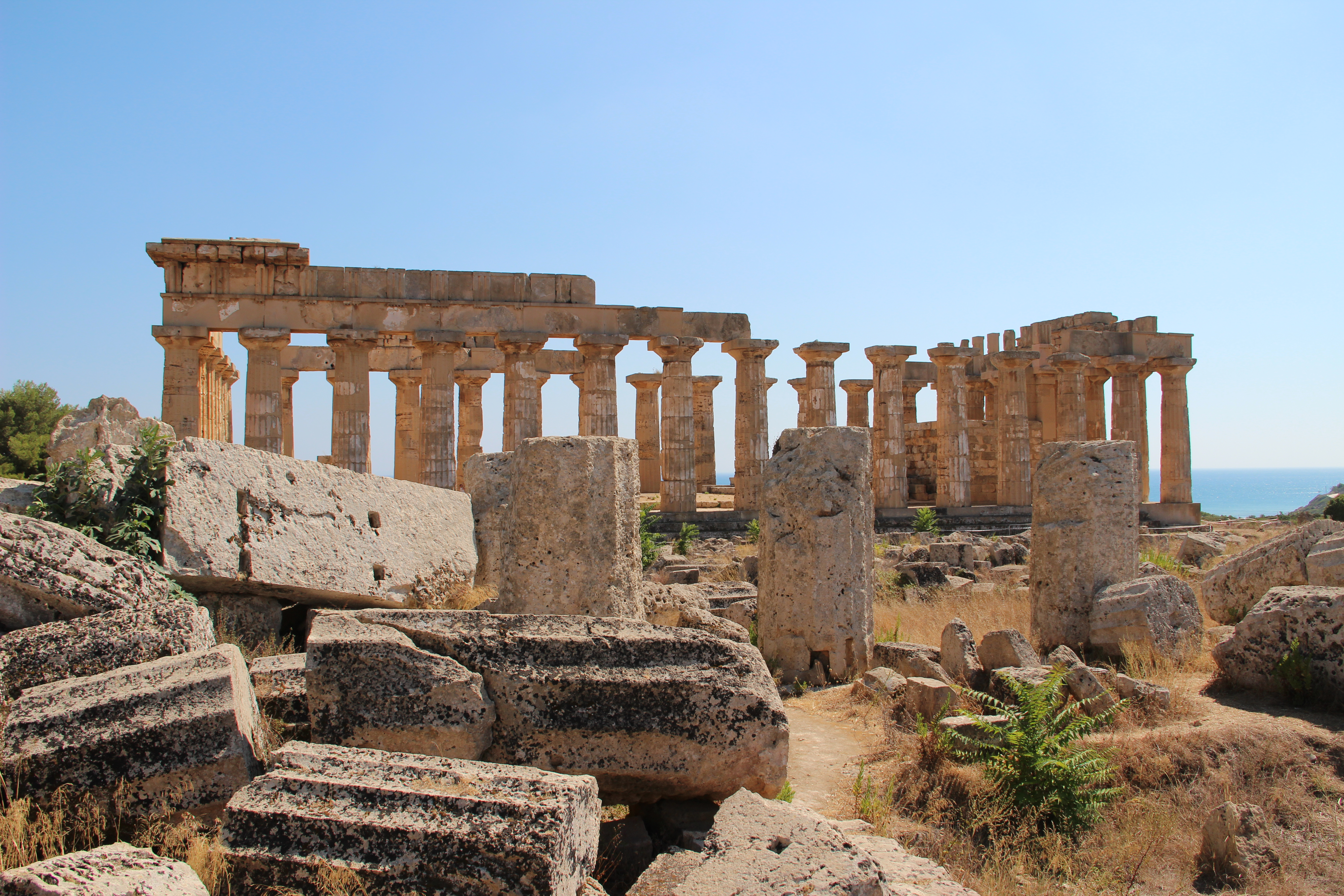 91022 Marinella di Selinunte, Province of Trapani, Italy